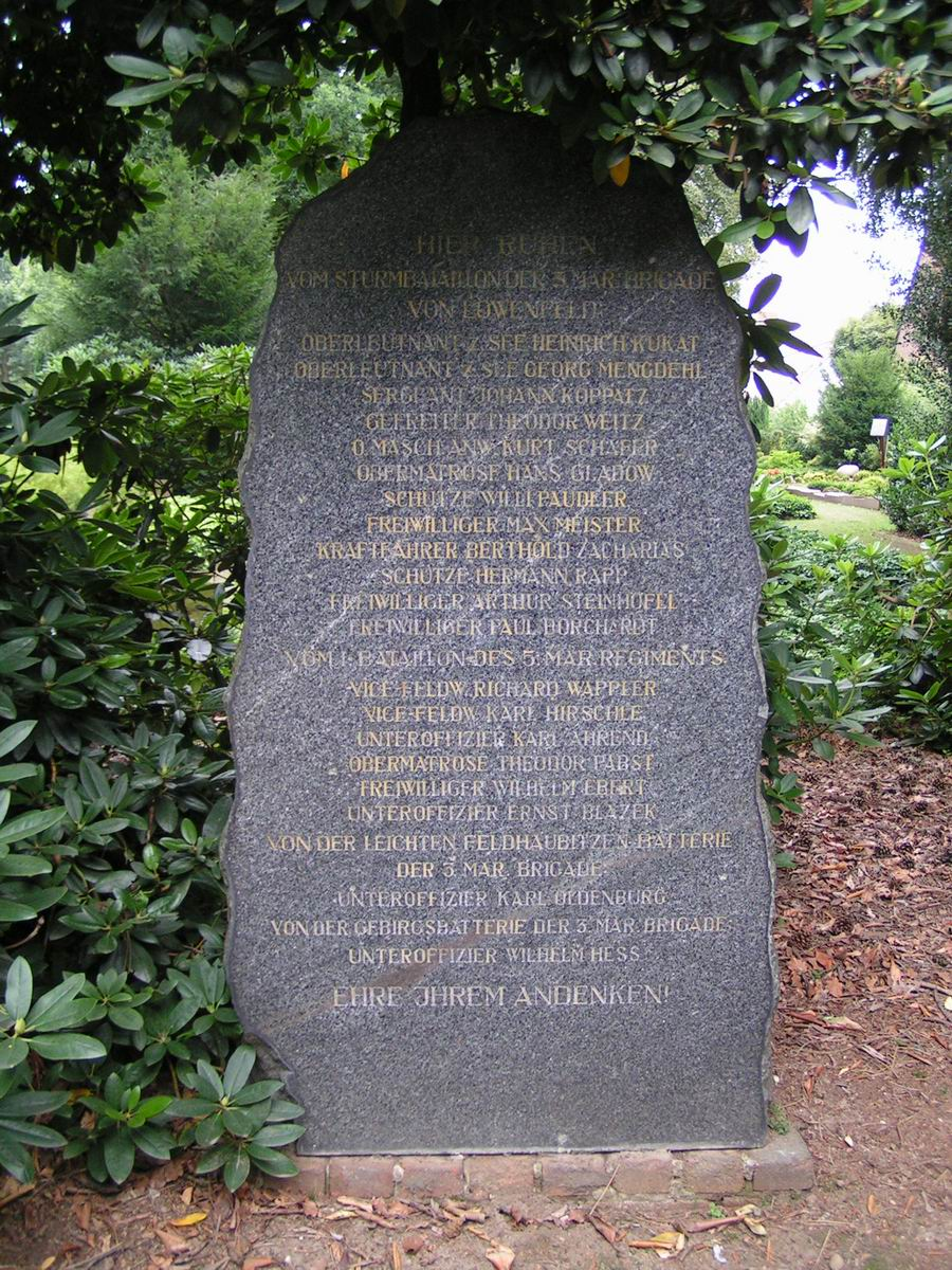 Ehrengrab für die Freikorpseinheit Marine-Brigade von Loewenfeld auf dem Friedhof Bottrop-Kirchhellen